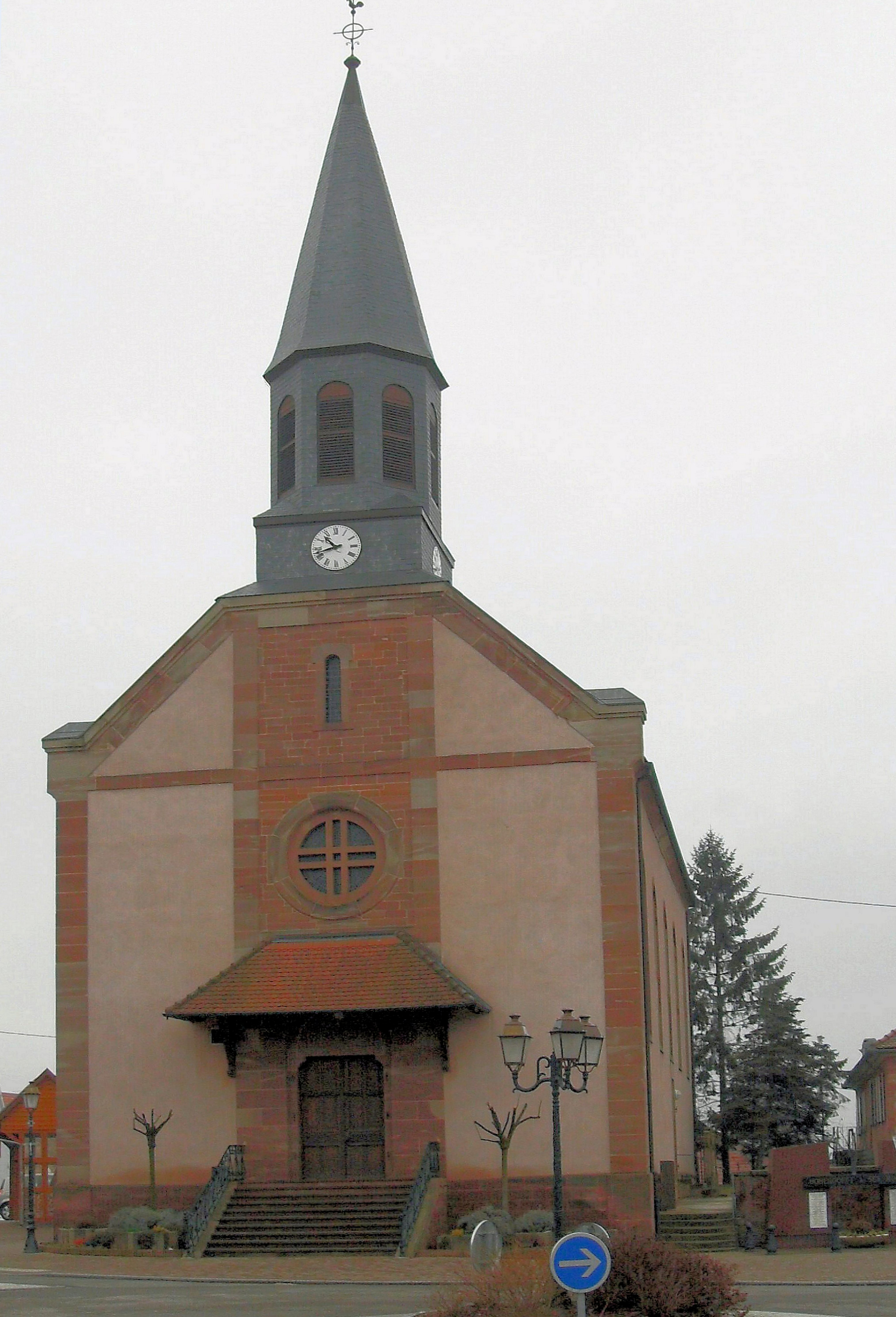 L'église Saint-Antoine à Hohengœft